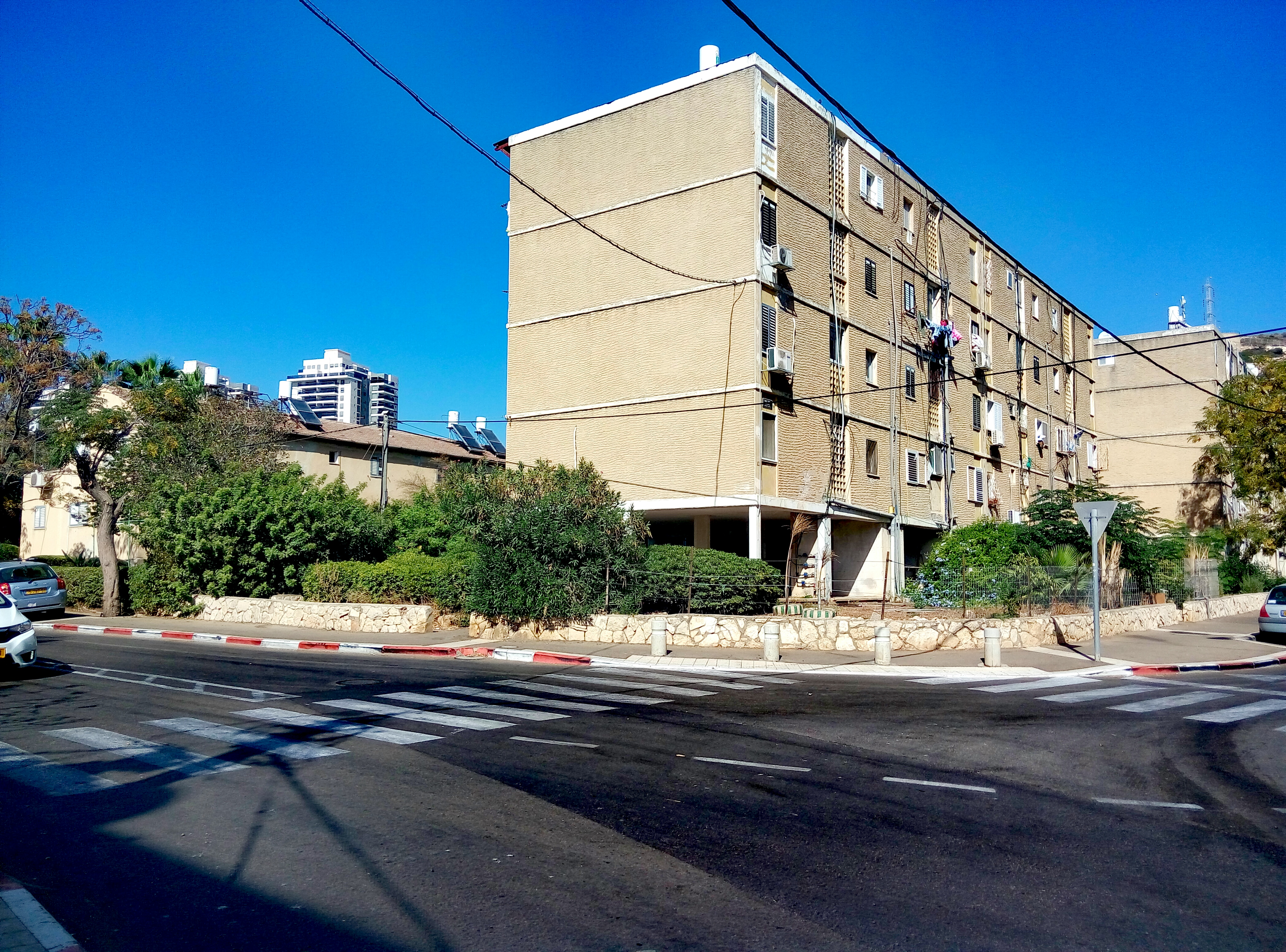 נווה דוד חיפה